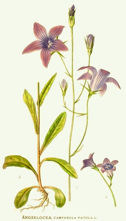 Original Description Ängsklocka, Campanula patula L.